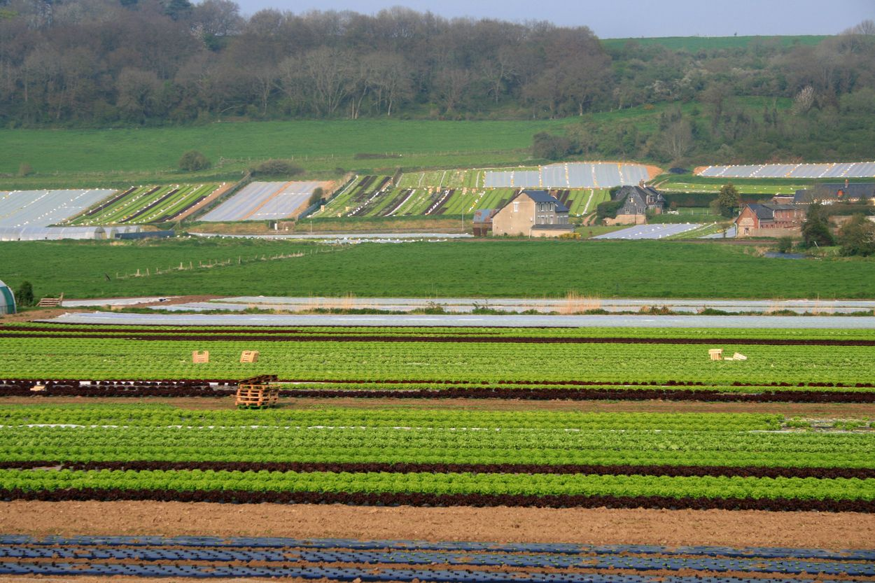 Maraîchage dans la vallée du Durdent, entre Vittefleur et Paluel, Seine-Maritime, Normandie, France.